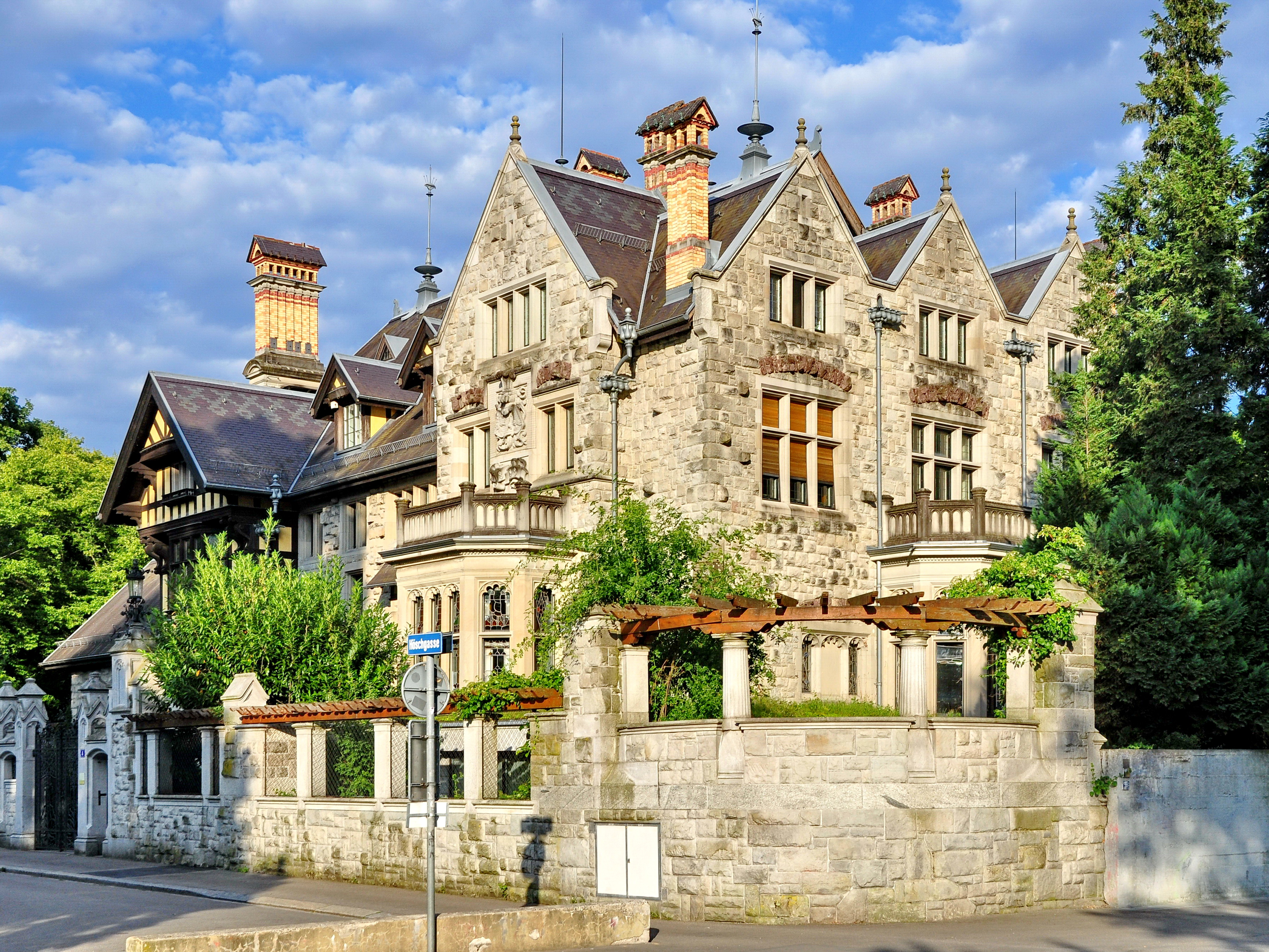 Villa Egli, Seefeldquai in Zürich-Seefeld (Switzerland)